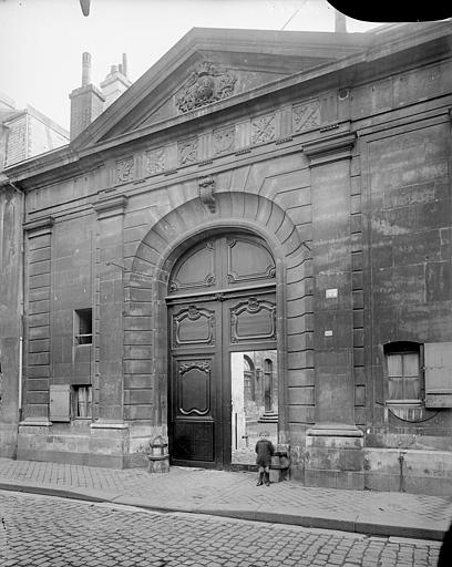 portail de l’hôtel de l'Intendance au 44 rue des Carmes à Caen.